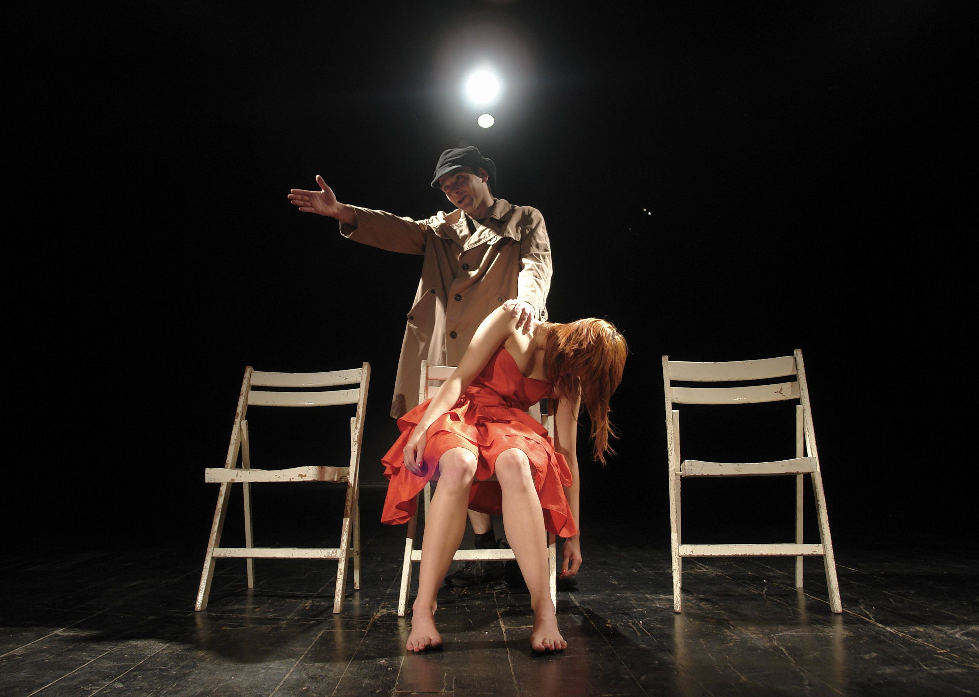 Teatr terminus A Quo w autorskim spektaklu "Usta/lenia". Nowa Sól, sala im. Ryszarda Cieślaka. Czerwiec 2010. Na zdjęciu aktorzy Eliasz Gramont oraz Adriana Boś